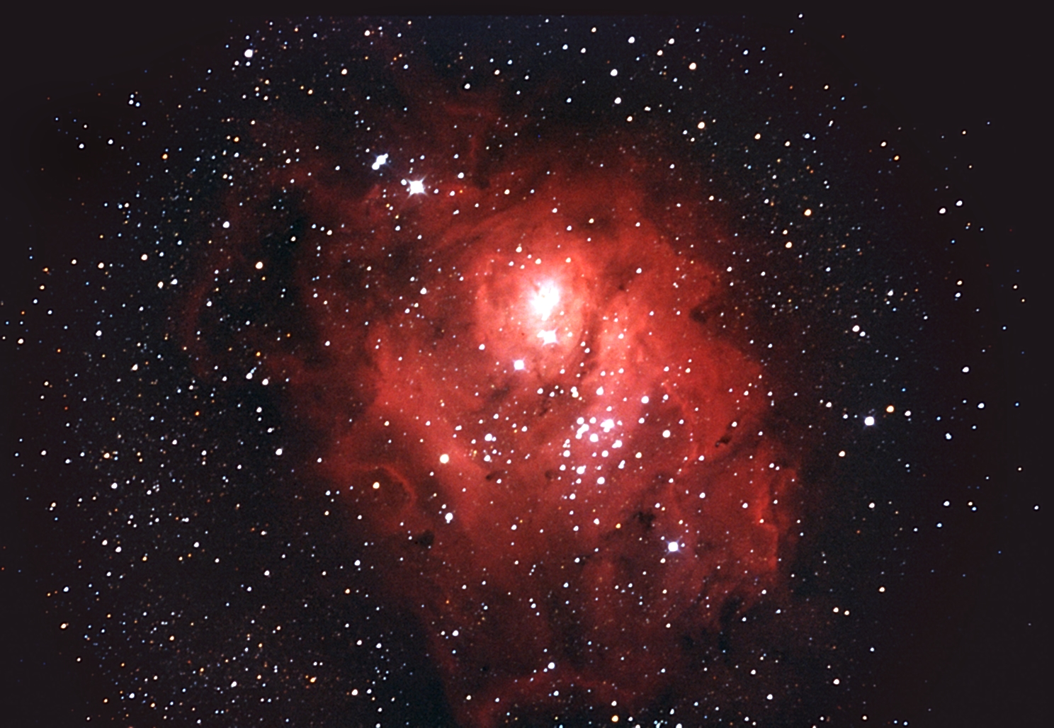 Nebulosa de la Laguna, número de catálogo M8. Capturada desde el Observatorio Cerro Pochoco en Santiago de Chile. M8, Lagoon Nebula usingn prime focus technic. This image was captured from Cerro Pochoco Observatory in Santiago, Chile.